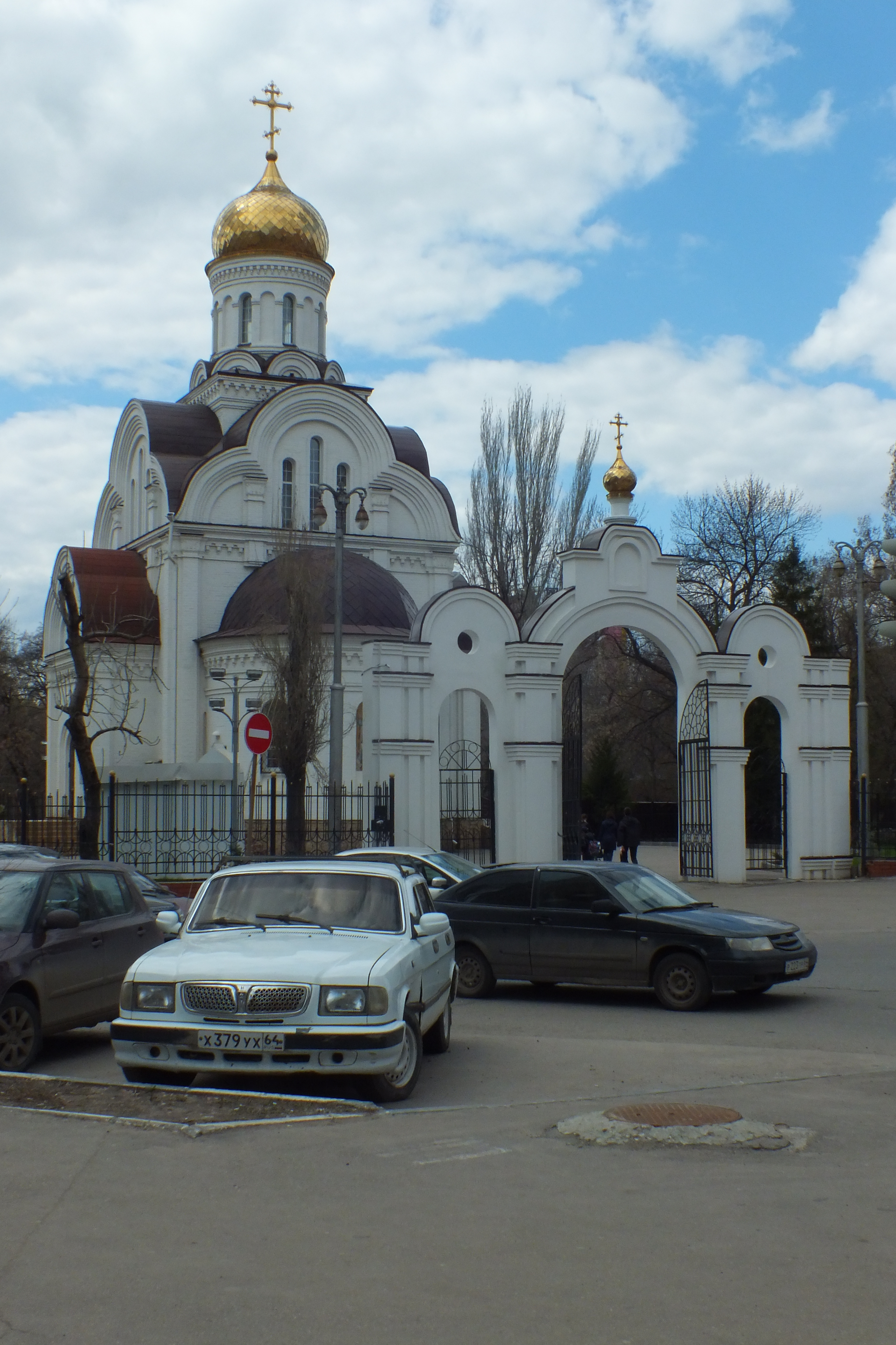 Собор Владимира Равноапостольного на углу Советской улицы и ул. Пугачёва Е. И. в Саратове, рядом с Детским парком.